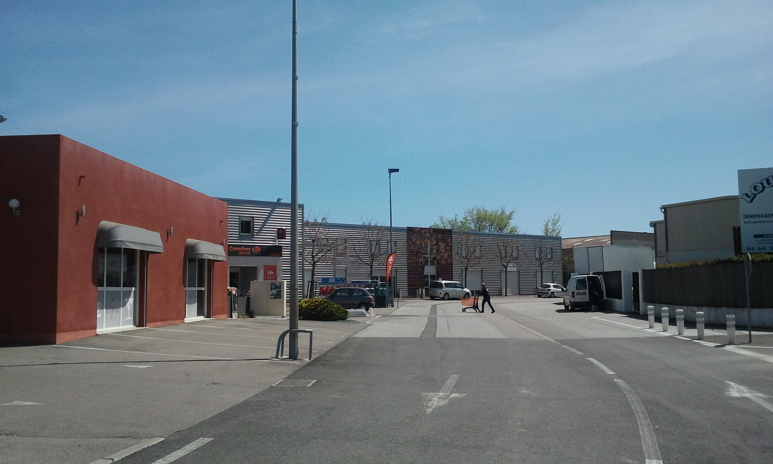 Entrée de la zone artisanale de Saint-Nazaire (Pyrénées-Orientales)